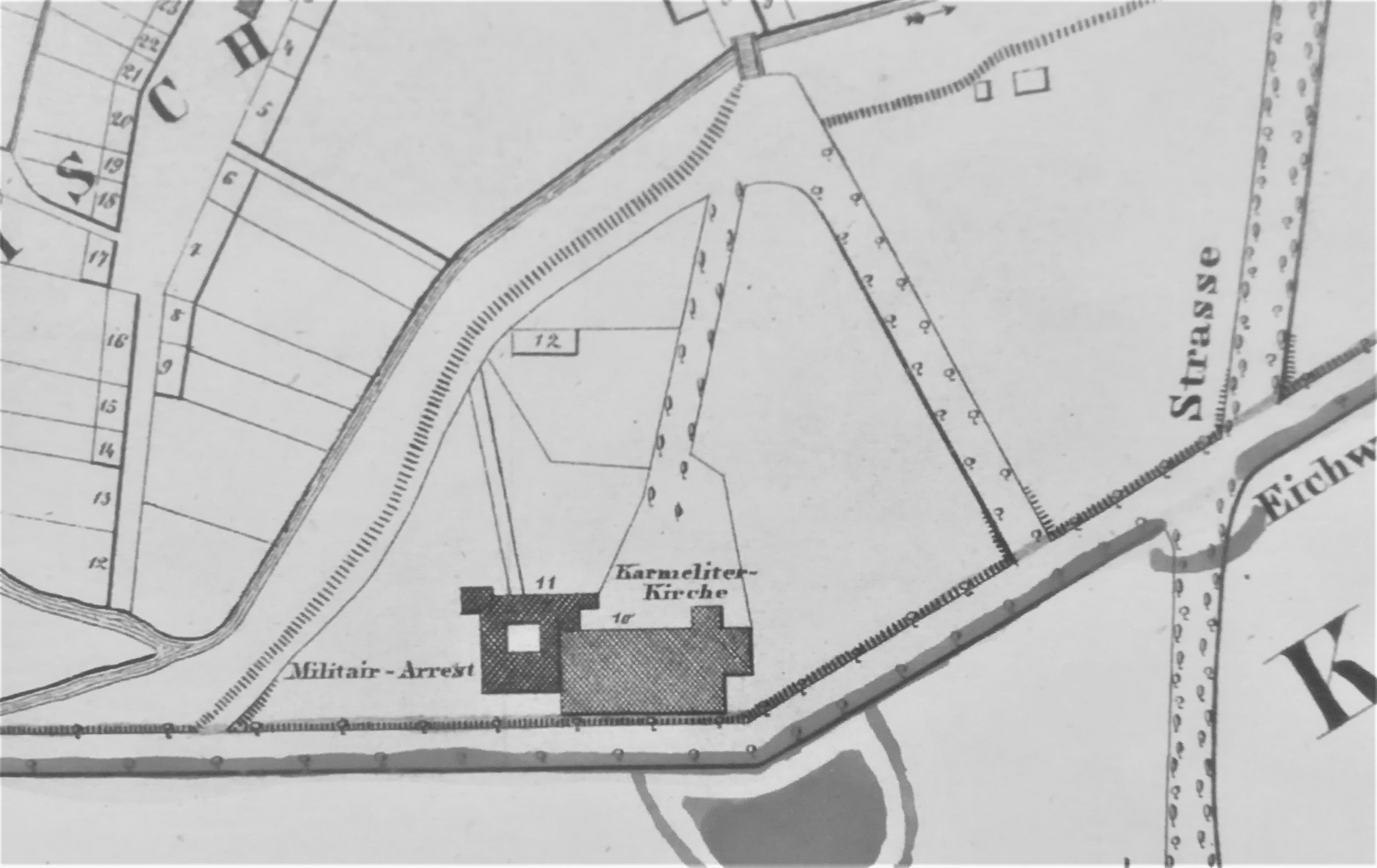 mapa Corvinusa - Poznań 1856 r. Karmelici na Piaskach.